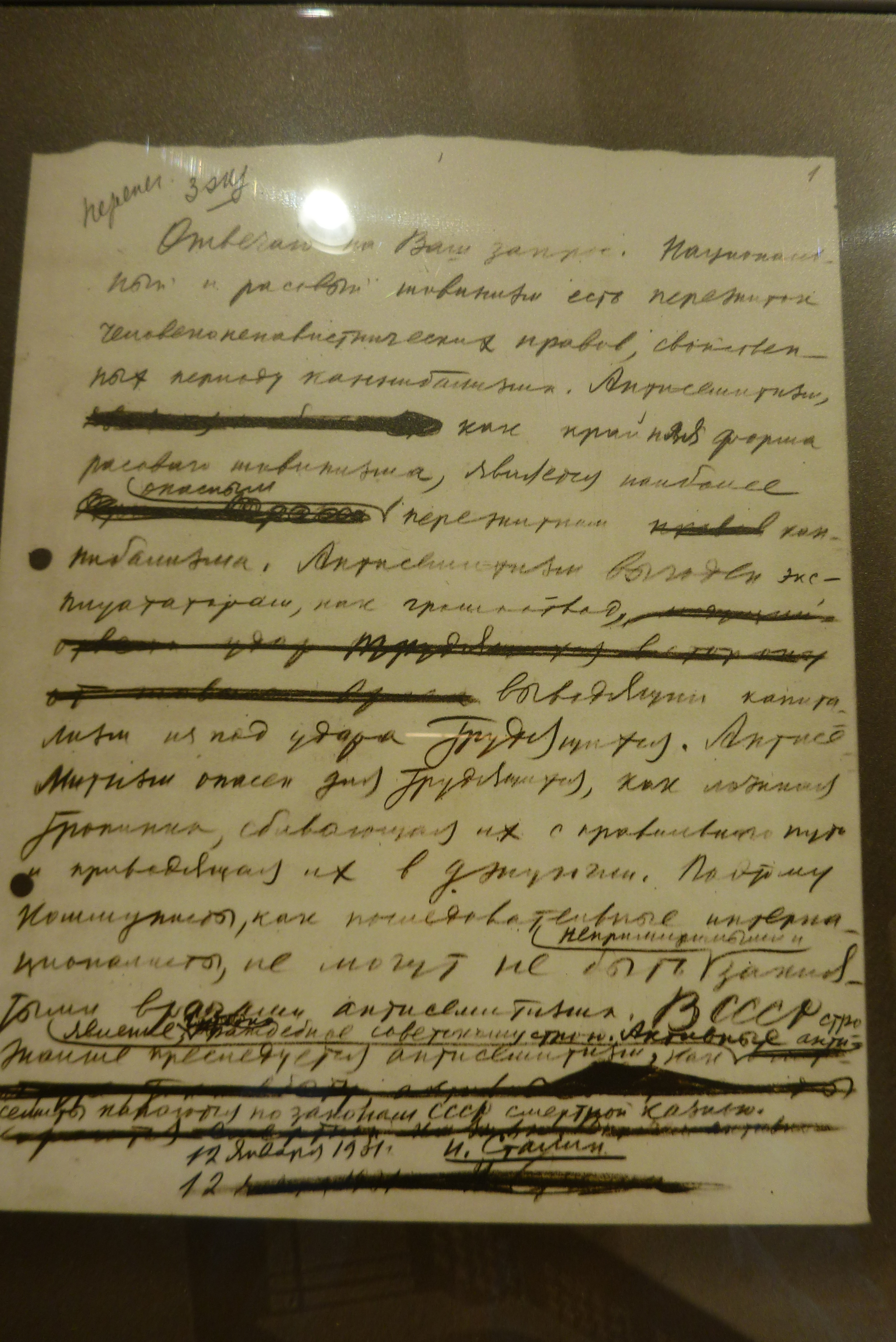 Черновик ответа И.В. Сталина Еврейскому телеграфному агентству (США) о борьбе с антисемитизмом в СССР от 12 января 1931 года. Был опубликован (беловик) в "Правде" 30 ноября 1936 года. Хранится в РГАСПИ. Ф. 558. Оп. 1. Д. 2952. Л. 1.